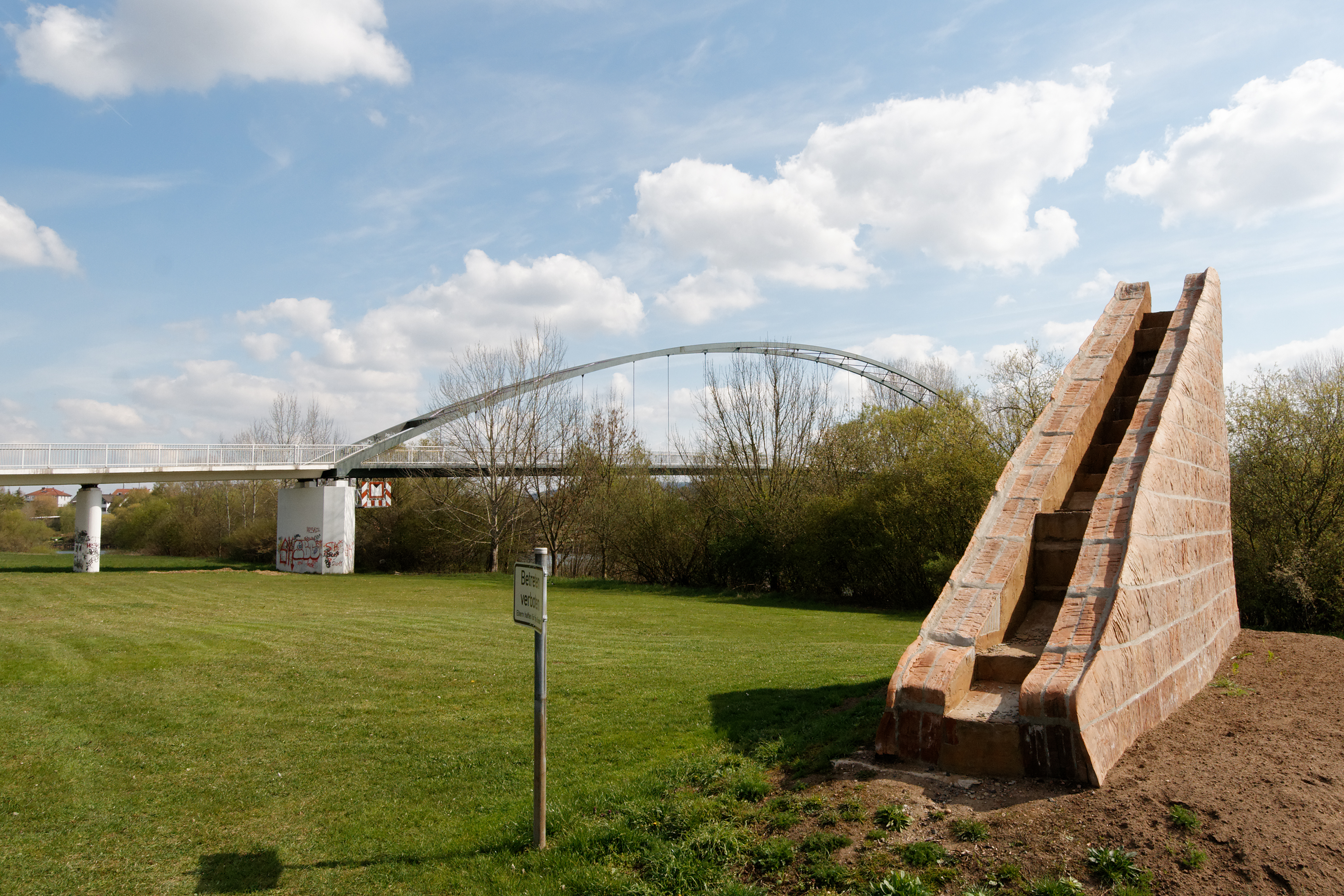 Kiliansbrücke Mainflingen, erbaut 1989, mit Skulptur „Himmelsleiter“ von Sigrid Siegele (2010); die Brücke über den Main verbindet Mainflingen (Hessen) mit Dettingen (Bayern). Sie ist für Fußgänger und Fahrradfahrer nutzbar.